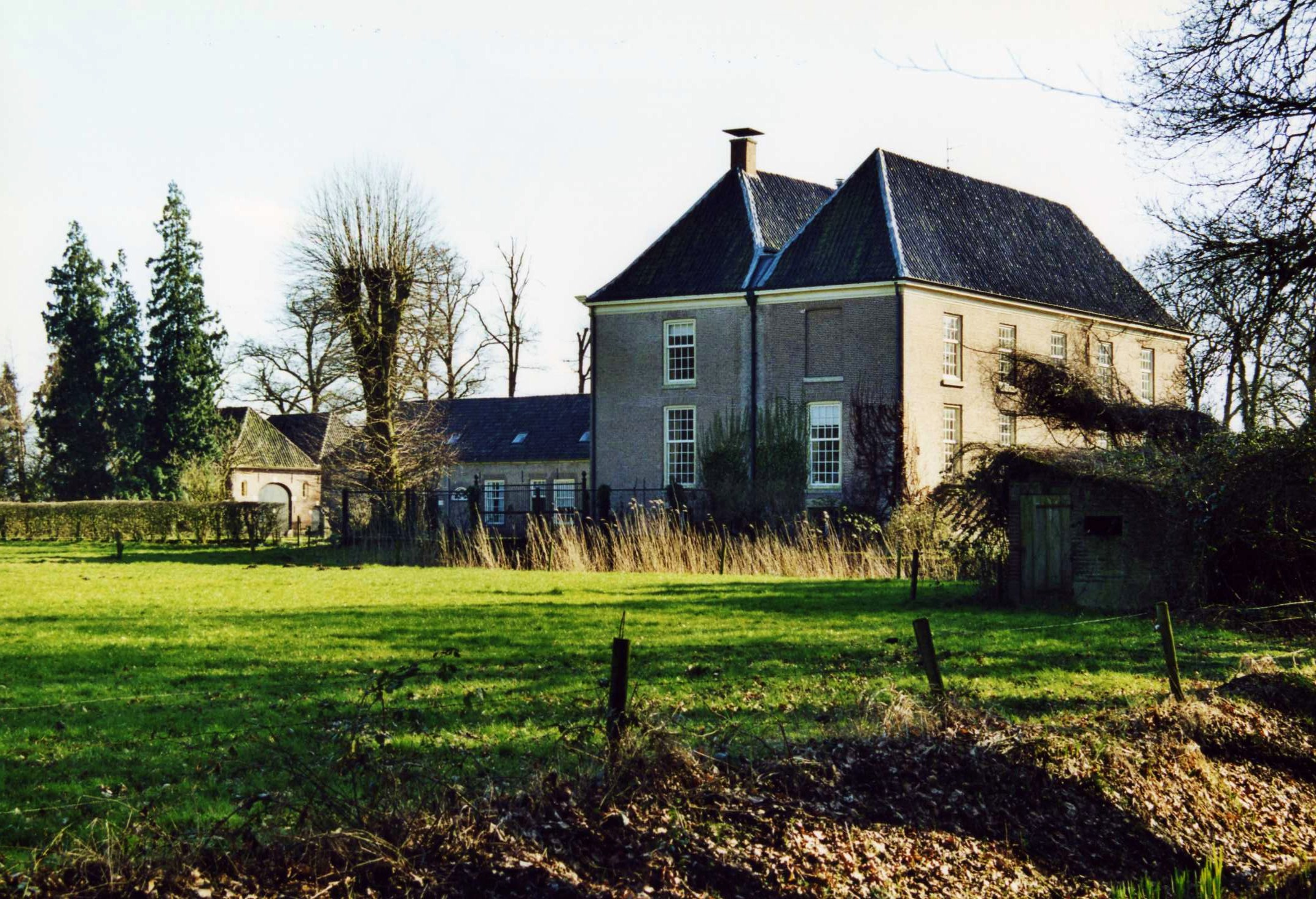 Huis Wegdam te Goor; het gebouwtje geheel links is het koetshuis.